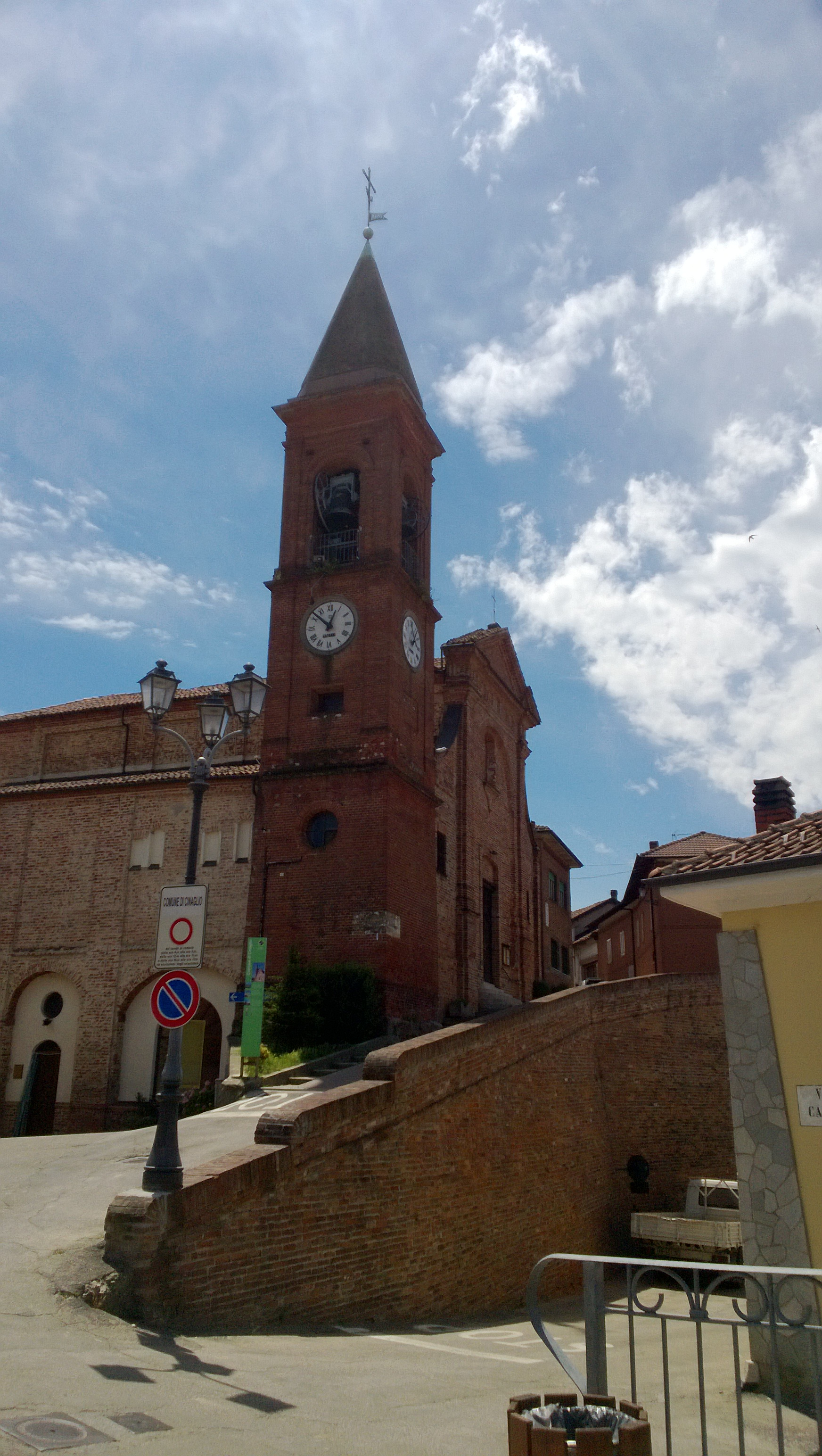 Campanile della chiesa parrocchiale di San Felice e San Giorgio a Cinaglio (AT), Italia.